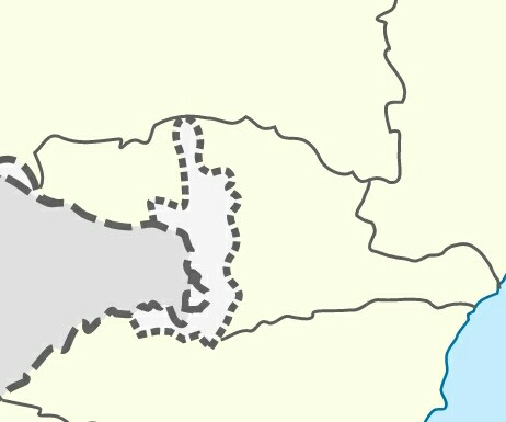 Yerusalem J2